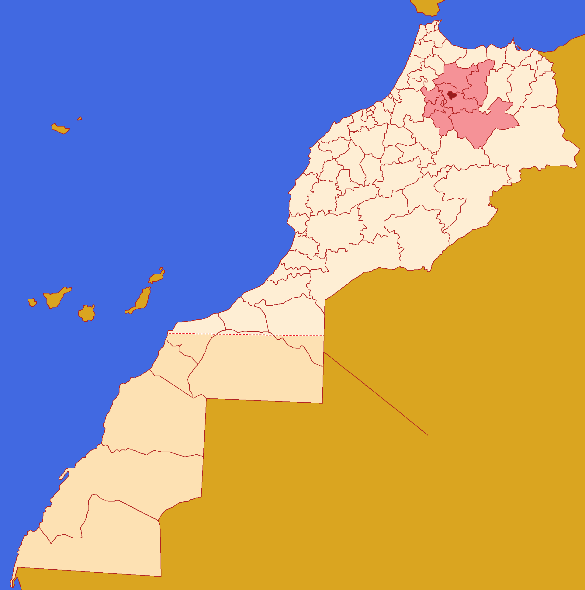 Localização da prefeitura de Fez, dentro da Região de Fez-Meknès, dentro de Marrocos